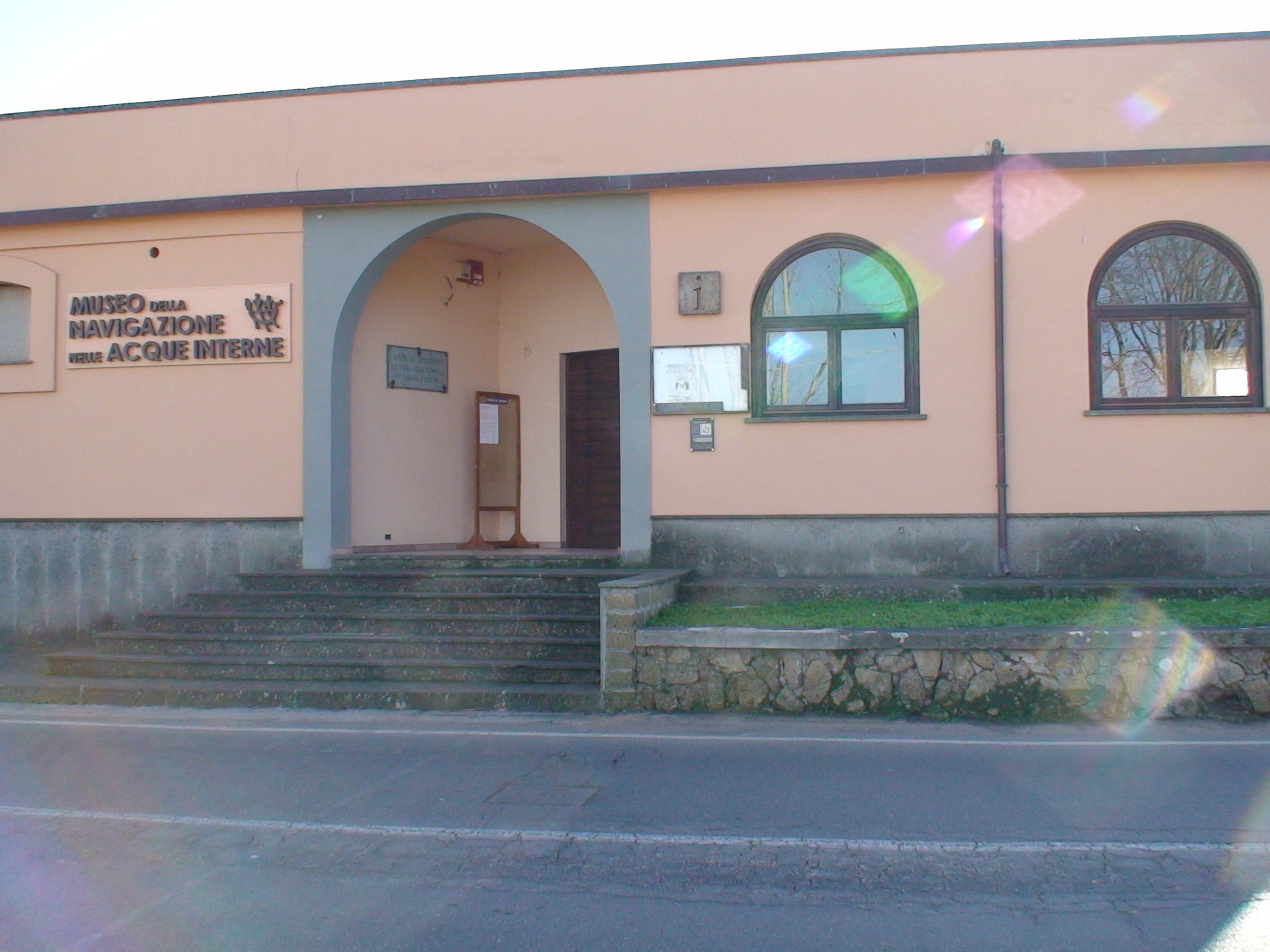 L'ingresso principale del Museo della Navigazione, sul lungolago di Capodimonte